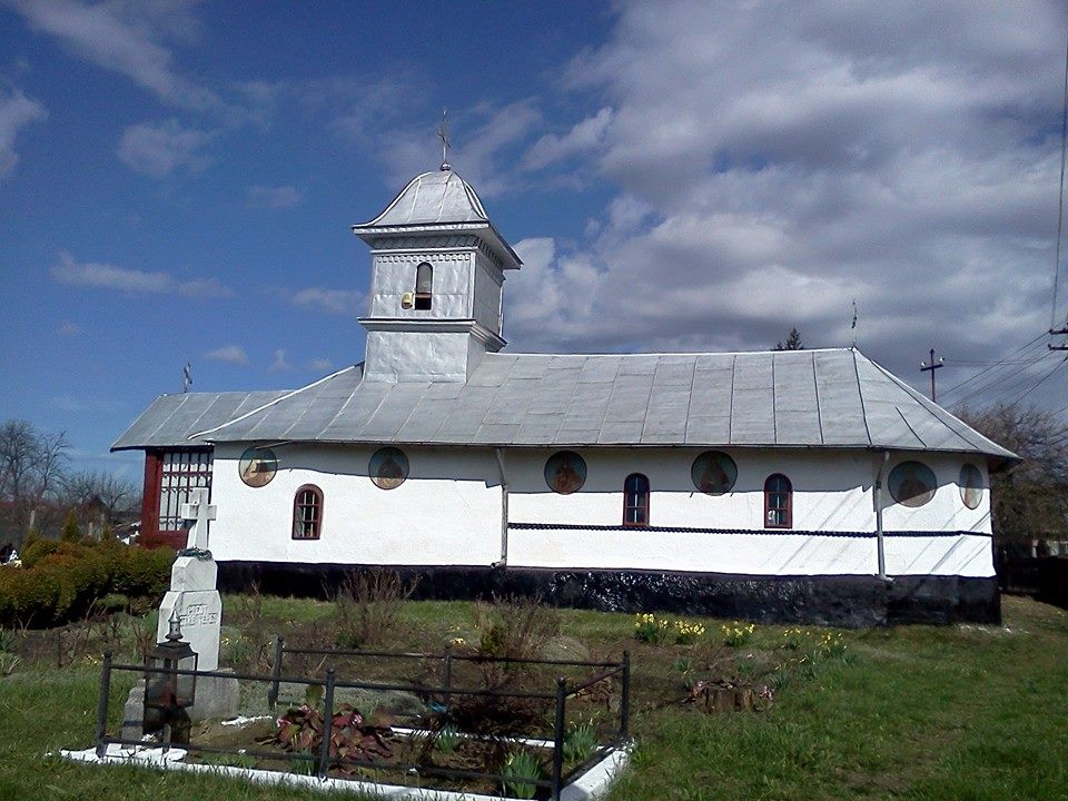 Biserica de lemn „Sf. Arhangheli Mihail și Gavriil”